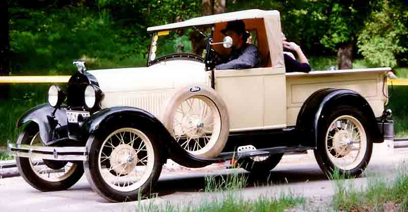 Ford Model A 76A Open Cab 1928